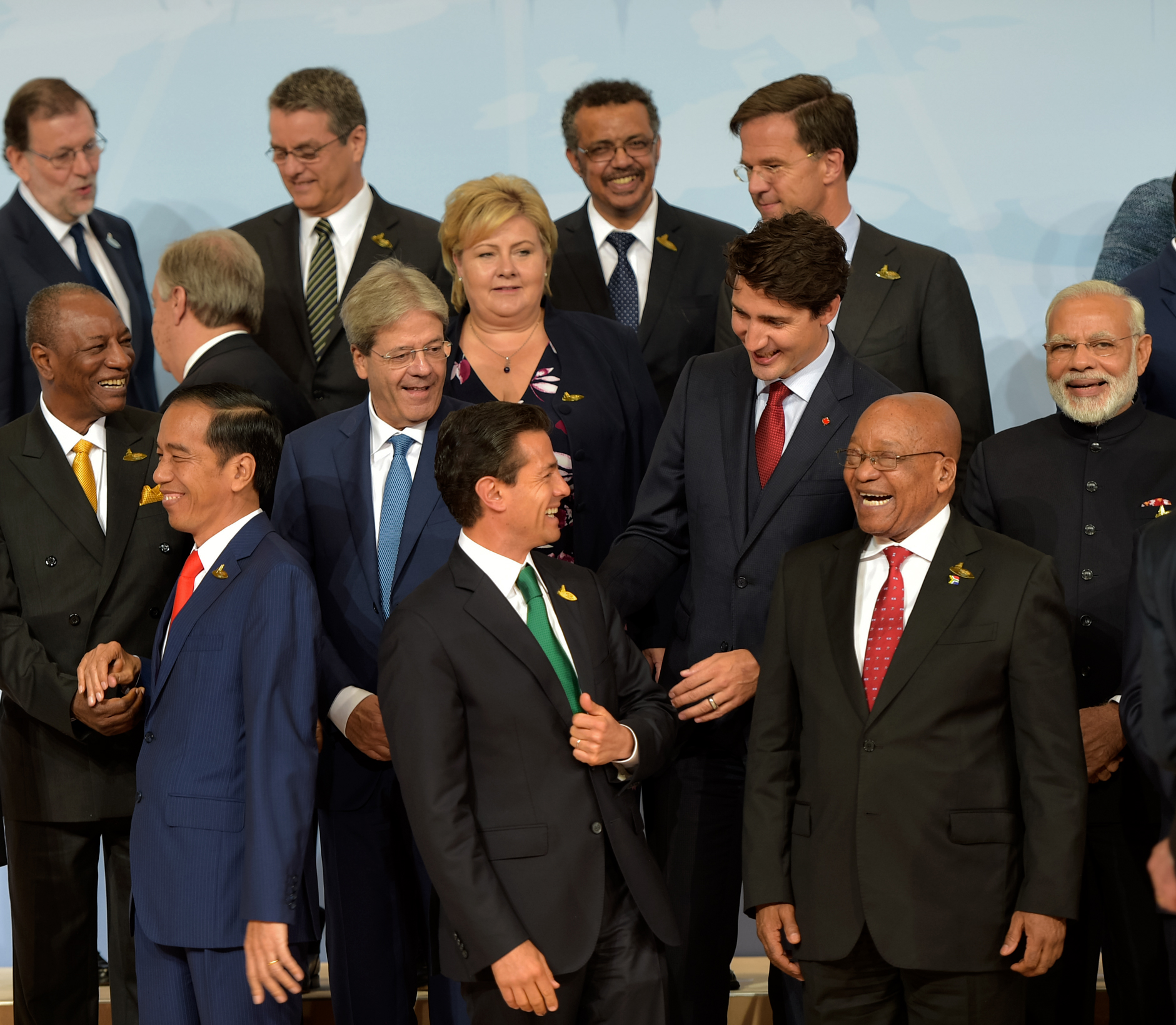 Cumbre de Líderes del G20